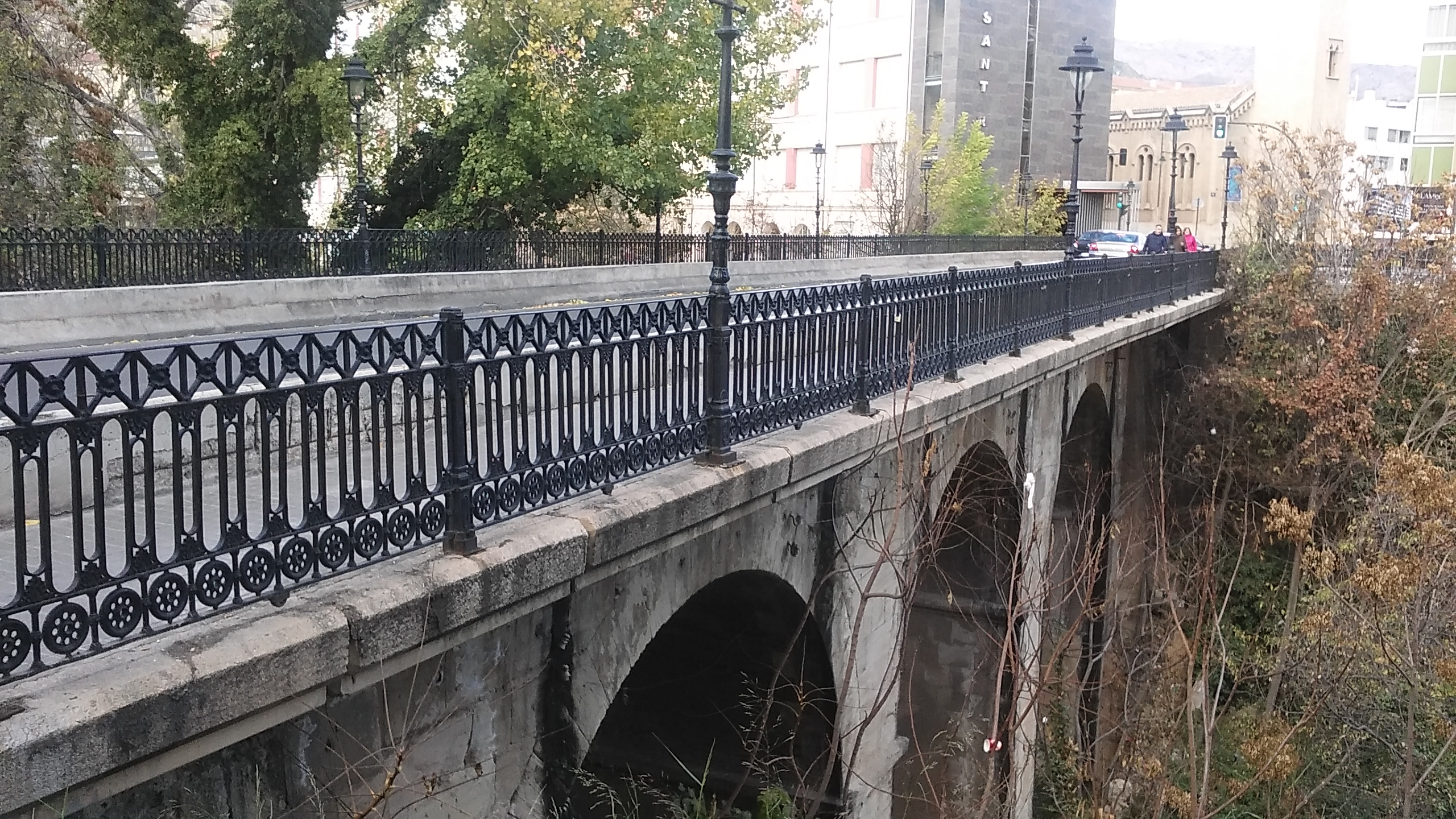 Pont de Sant Roc en Alcoy (Alacant).